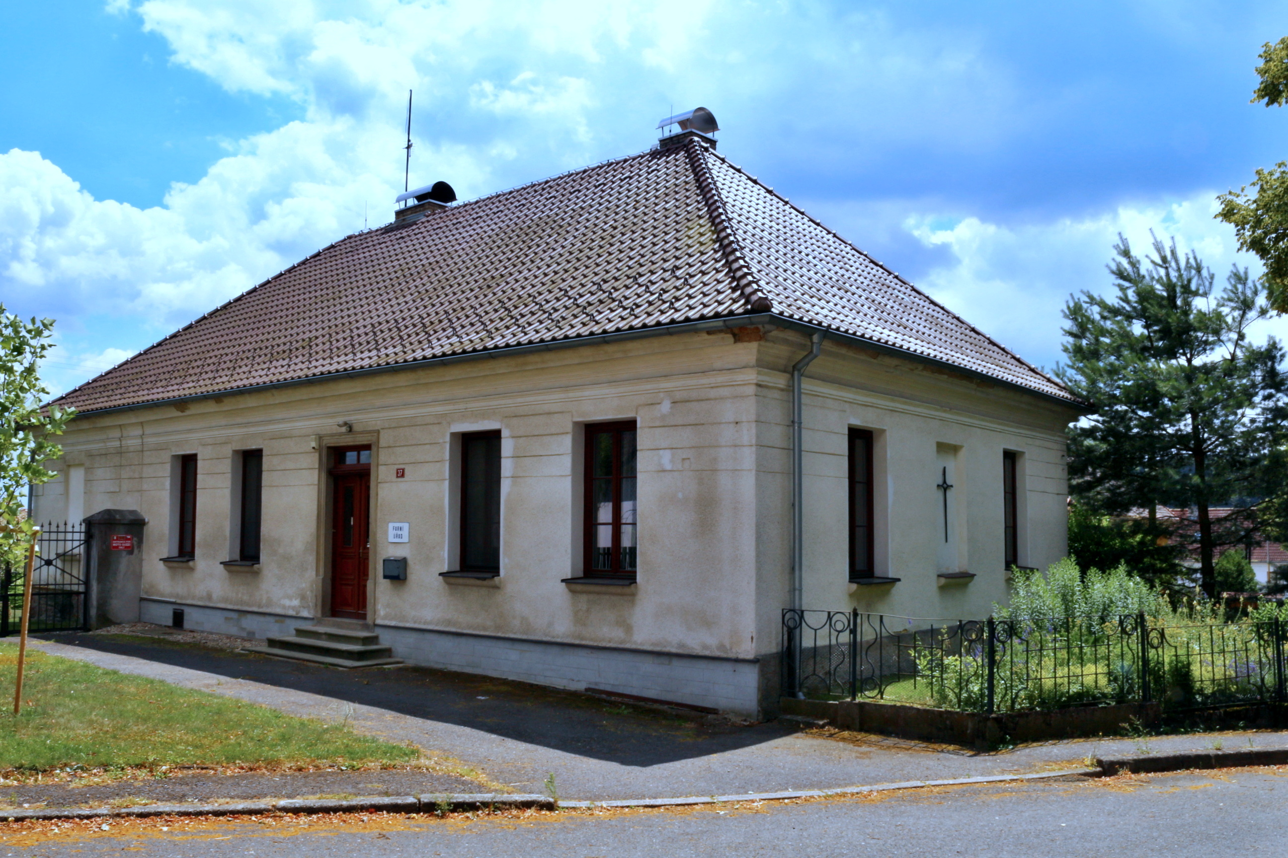 Keblov, náves